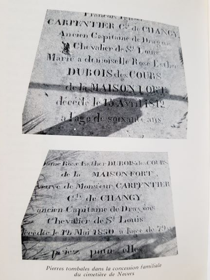 Pierres tombales François Ignace et Rose Esther